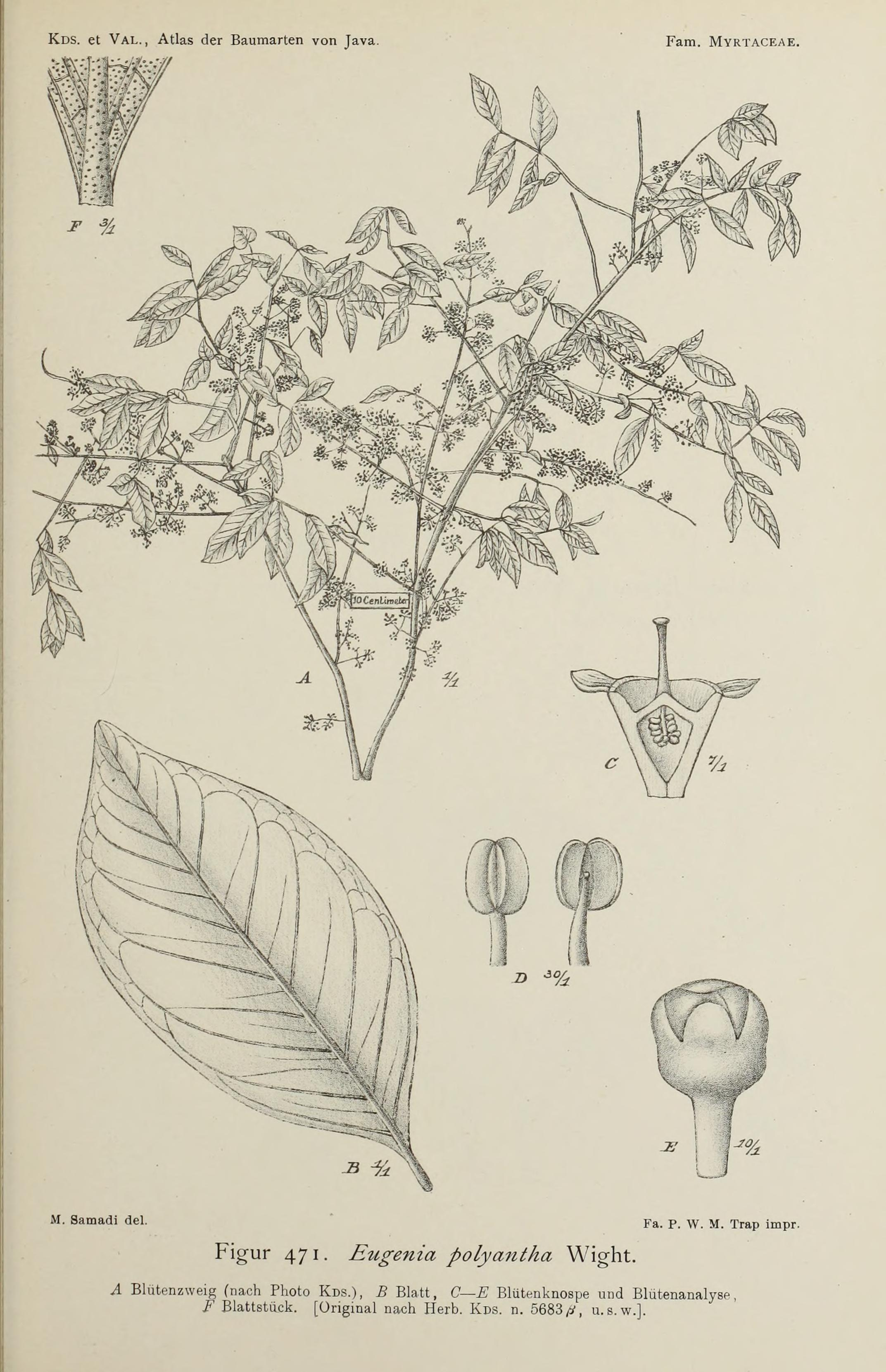 Atlas der baumarten von Java : im anschluss an die "Bijdragen tot de kennis der boomsoorten van Java" / zusammengestellt von dr. S.H. Koorders und dr. Th. Valeton ; mit unterstützung der Niederländsch- indischen regierung ; Herausgegeben von dr. S.H. Koorders.